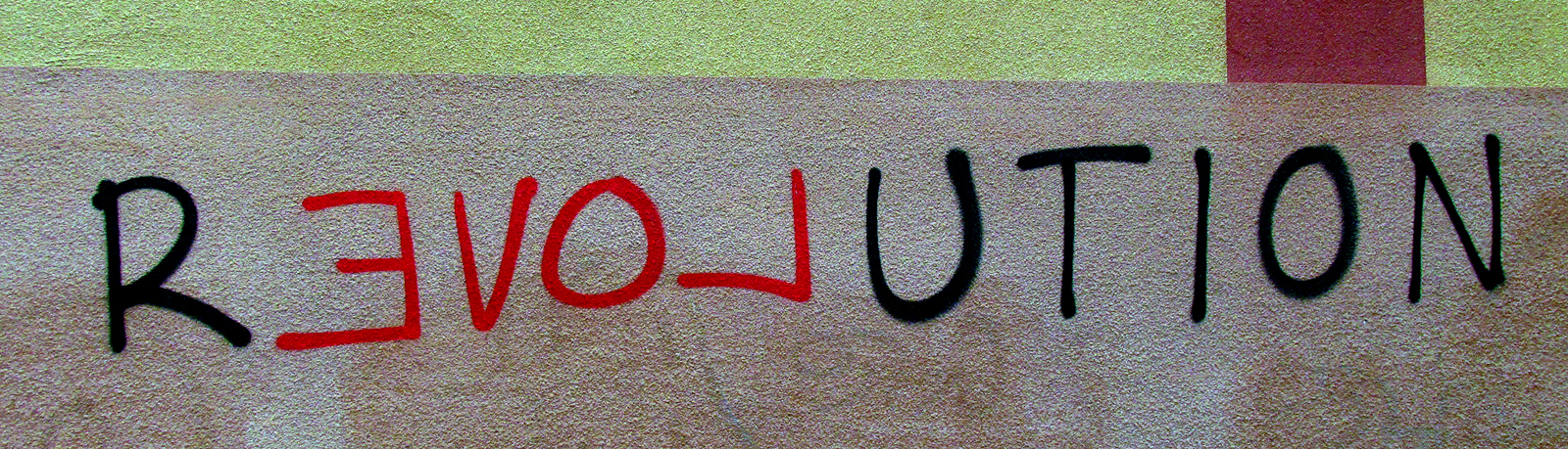 R E V O L U T I O N , graffiti med politiskt budskap på en husvägg i centrala Ystad 2014.